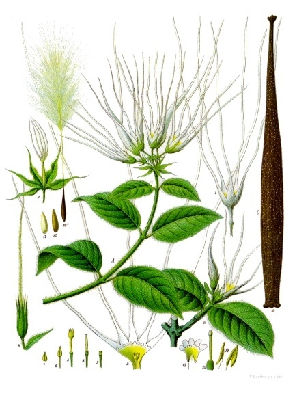 Strophantussamenpflanze. A blühender Zweig von Strophanthus hispidus D. C., natürl. Grösse; B desgl. von Strophanthus Kombé Oliv., desgl.; 1 Blumenkrone von Stroph. hispidus, desgl.; 2 dieselbe auseinandergebreitet, desgl.; 3, 4 Blüthe mit Kelch, desgl.; 5—9 innere Blüthentheile (Staubgefässe, Stempel und Fruchtknoten), desgl.; 10 Balgfrucht in 1/2 natürl. Grösse, nach einem Exemplar, welches uns Herr Professor Husemann gütigst übersendet hatte; 10a Same mit Haarkrone, nat. Grösse; 11 u. 12 Samen verschiedener Sorten, ohne Haarkrone, desgl.; 13 ausgebreitete Blumenkrone von Strophanthus Kombé mit abgeschnittenen Zipfeln, desgl.; 13 u. 14 Stempel und Staubgefässe derselben Art, vergrössert.